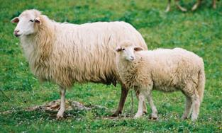 Ovella Menorquina